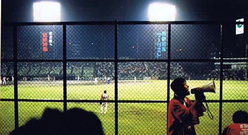 日生球場ライト側スタンドから撮影（1989年ごろ）